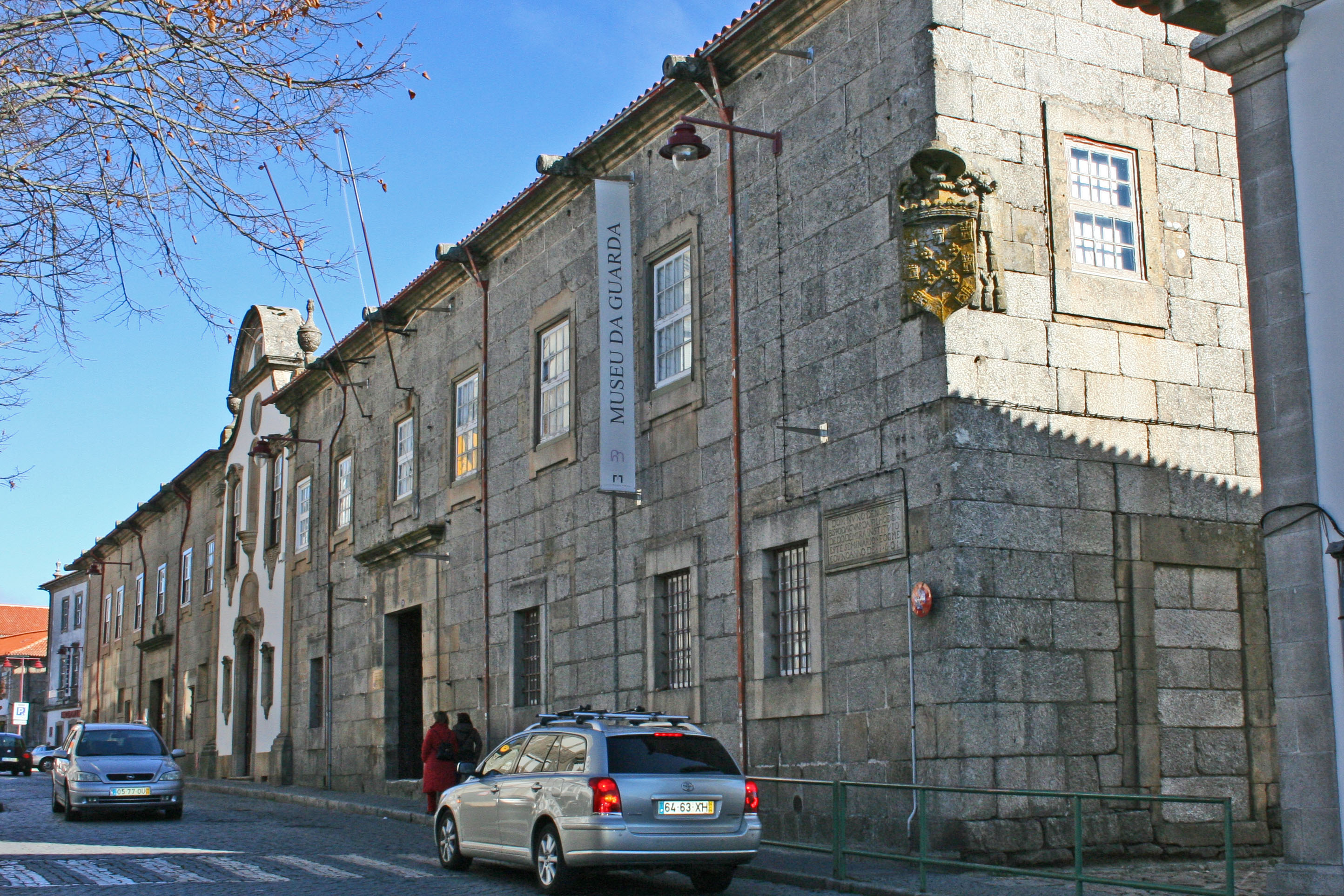 Antigo Paço Episcopal da Guarda e Seminário This file was uploaded for Wiki Loves Monuments in Portugal with the unique identifier 74993.